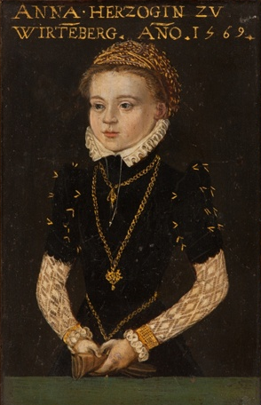 Portret księżnej Anny Wirtemberskiej.